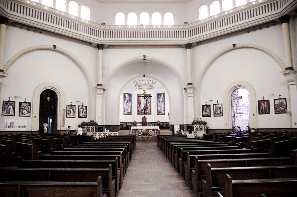 Interior da Catedral de São Carlos.